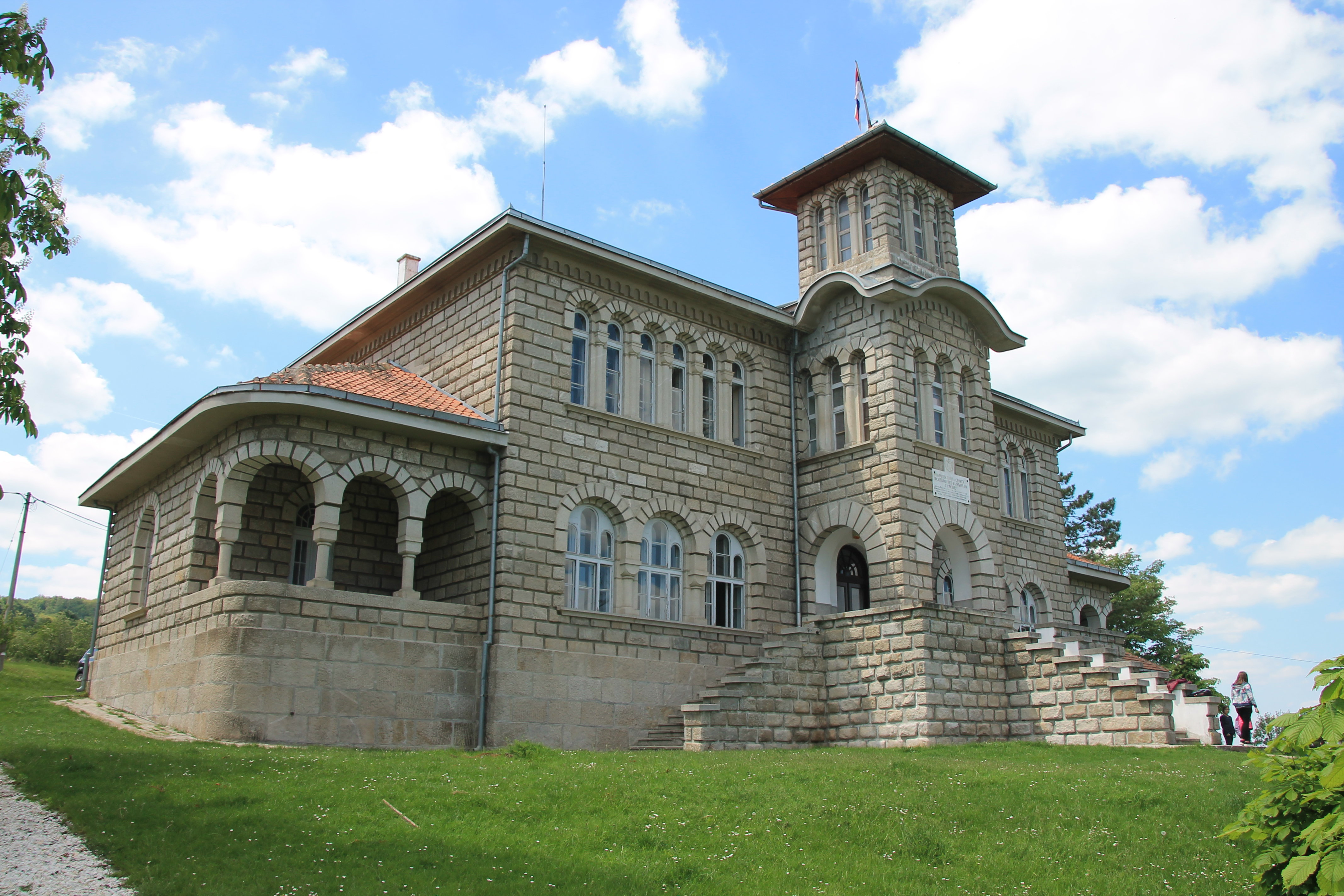 Znamenito mesto Orašac